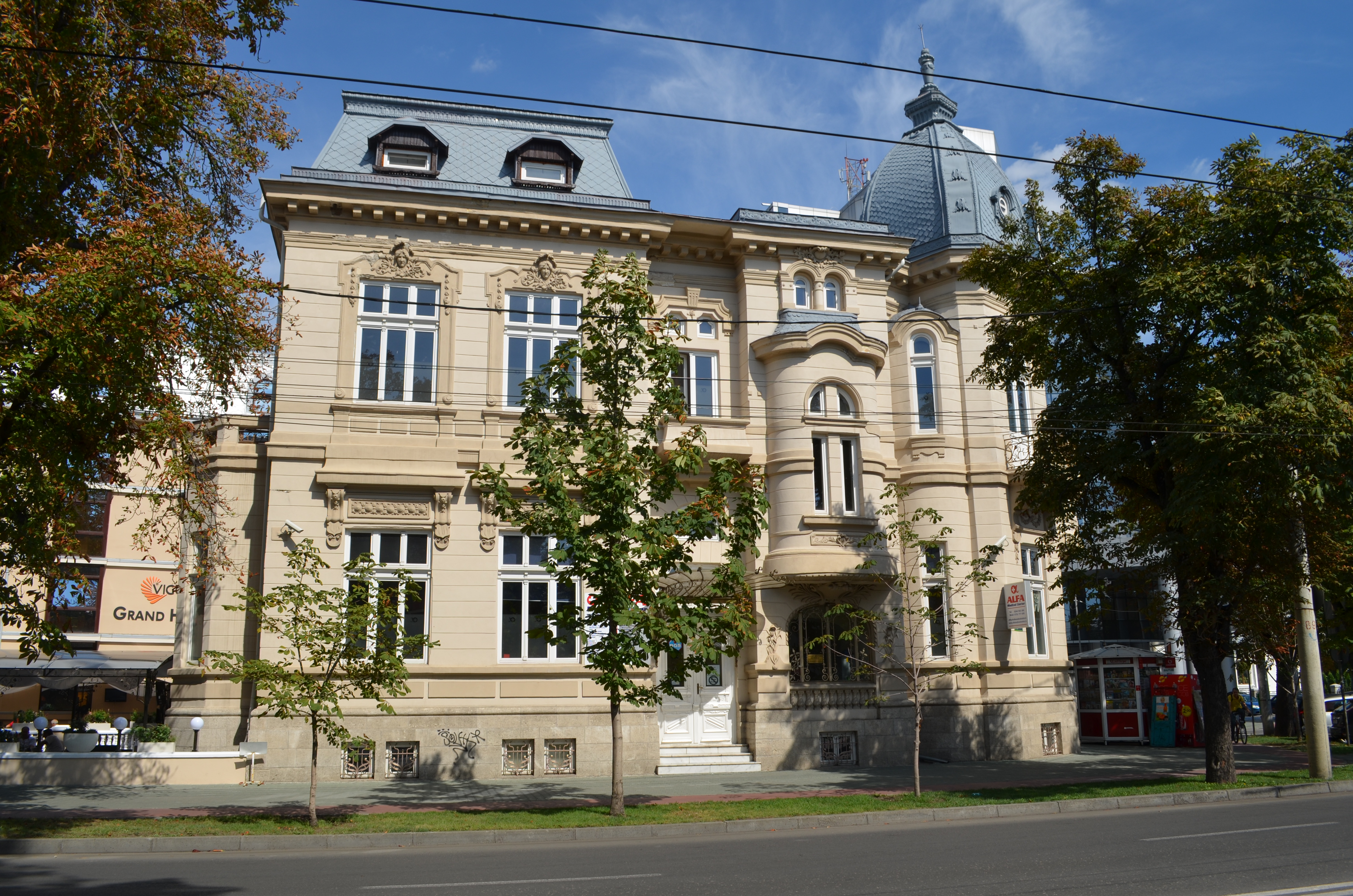 Casa Ghiță Stoenescu, azi clinica Alfa Medical Center, Bd. Independenței nr. 27, Ploiești